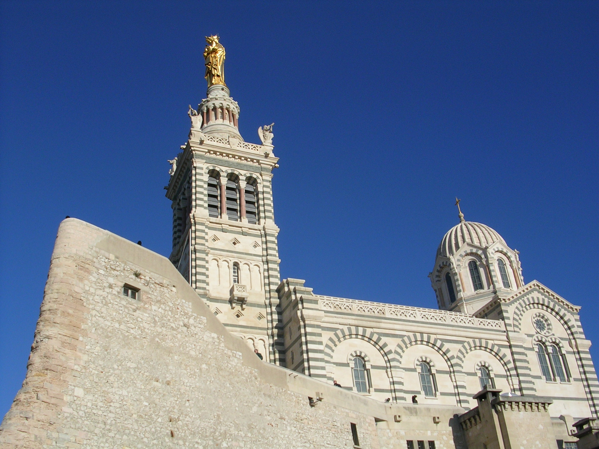 Vue extérieure de Notre-dame-de-la-garde à Marseille (France)